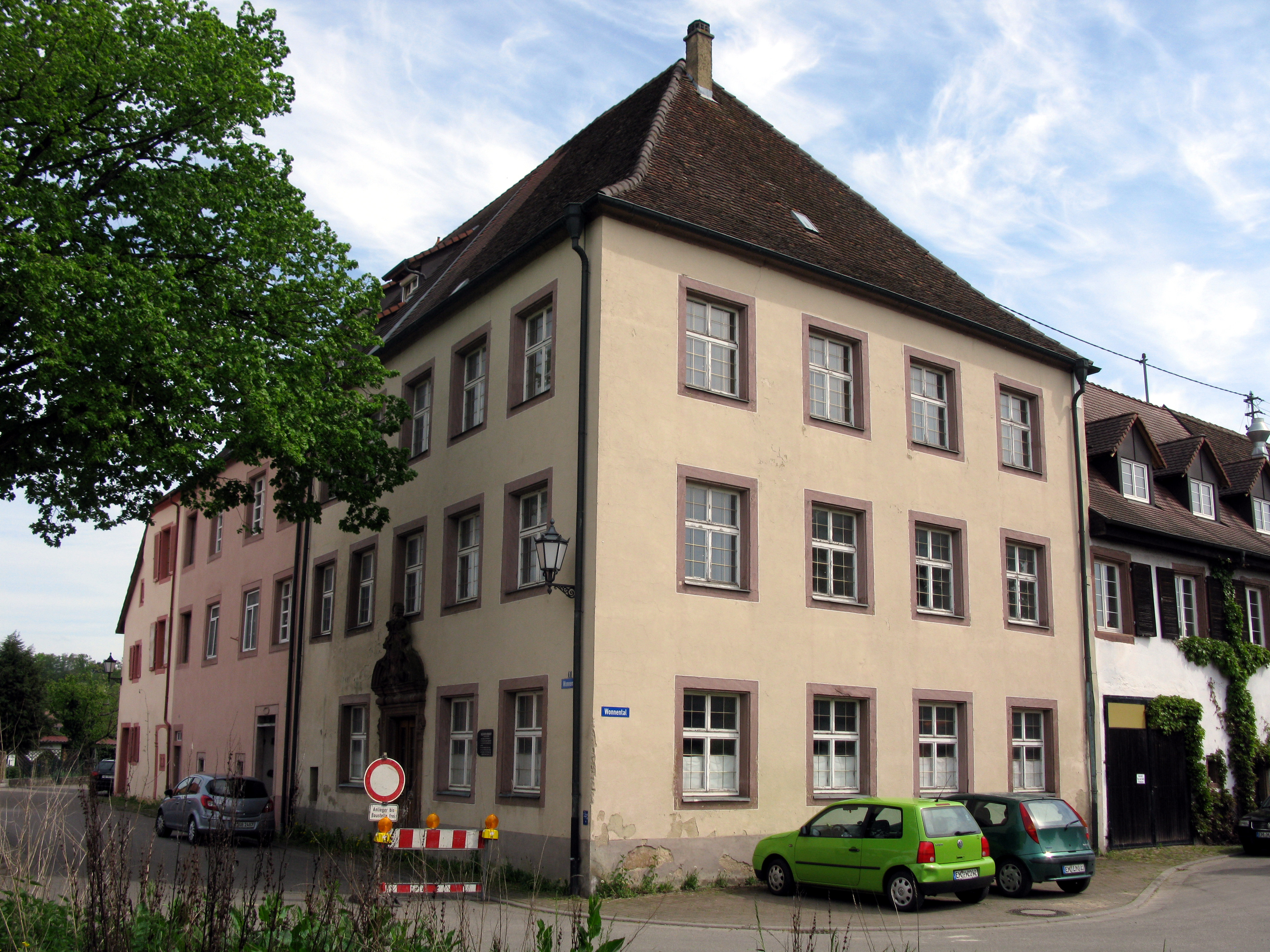 Ehemaliges Kloster Wonnental in Kenzingen